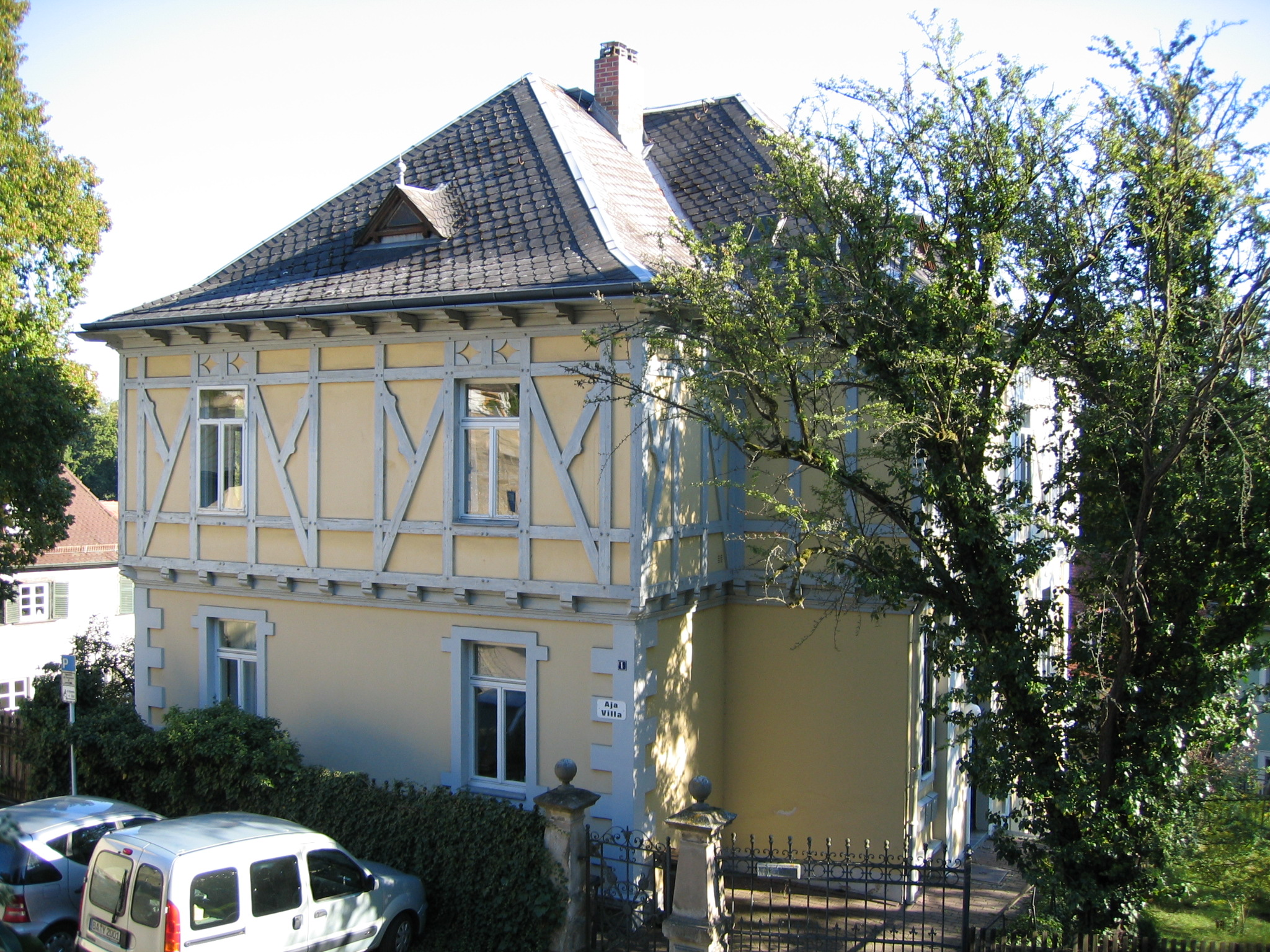 Bamberg, Jakobsplatz 1 ("Aja Villa"), wo der Schriftsteller und Übersetzer Hans Wollschläger zwischen 1975 und 1998 gewohnt und unter anderem die 1982 veröffentlichte Fassung seines in Bamberg spielenden historischen Avantgarde-Romans Herzgewächse oder Der Fall Adams geschrieben hat (Zuvor wohnte Wollschläger an folgenden Bamberger Adressen: E.T.A.-Hoffmann-Straße 2, Heinrichsdamm 10, Dr.-Haas-Straße 2b und Hohe-Kreuz-Straße 43).